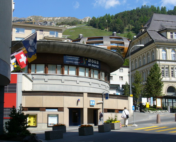 St. Moritz Dorf